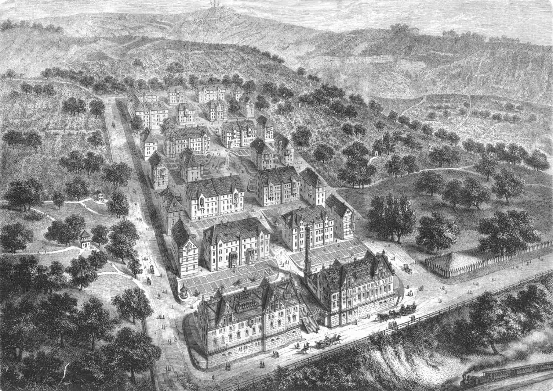 Das Quartier der Staatsverkehrsbediensteten in Stuttgart (Postdörfle), Vogelperspektive, 1872.